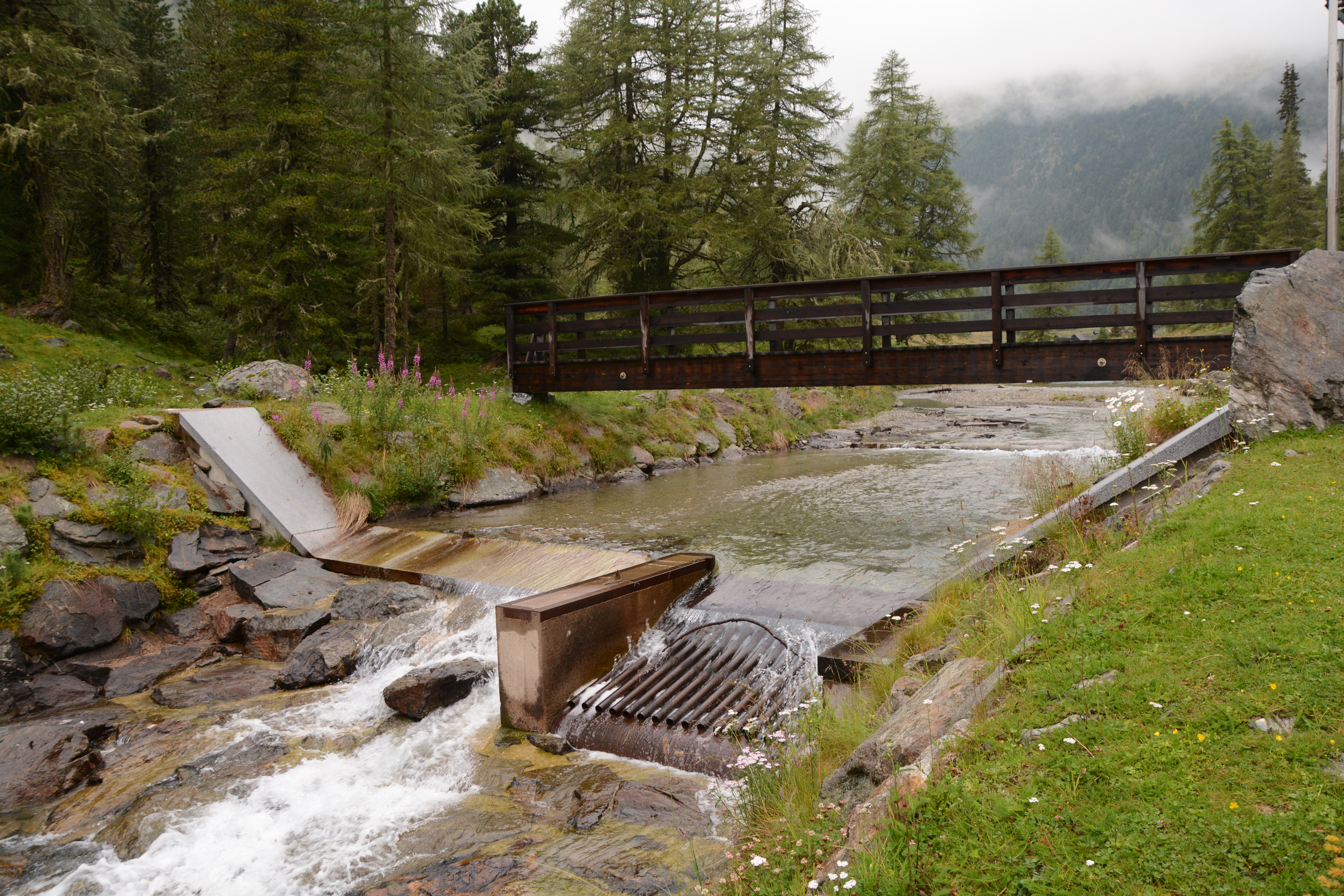 Der Trojer Almbach in der Gemeinde St. Jakob in Defereggen, Bezirk Lienz.